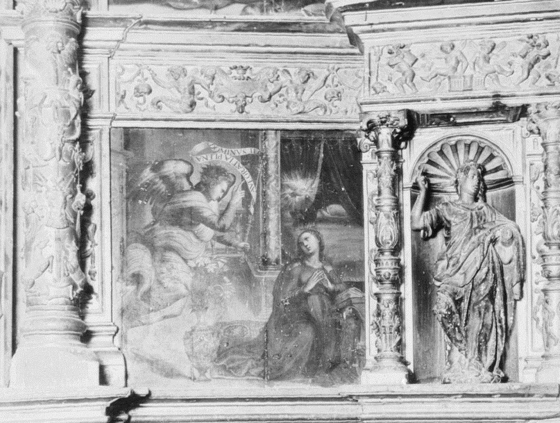 Detalle del retablo mayor de la iglesia parroquial de Pozuelo del Rey (Madrid), destruido en 1936.